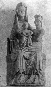 Träskulptur, Anna själv tredje. 1400-talets senare del. This version cropped and enhanced. Kategori: (05) SkulpturerTräskulptur, Anna själv tredje. 1400-talets senare del.